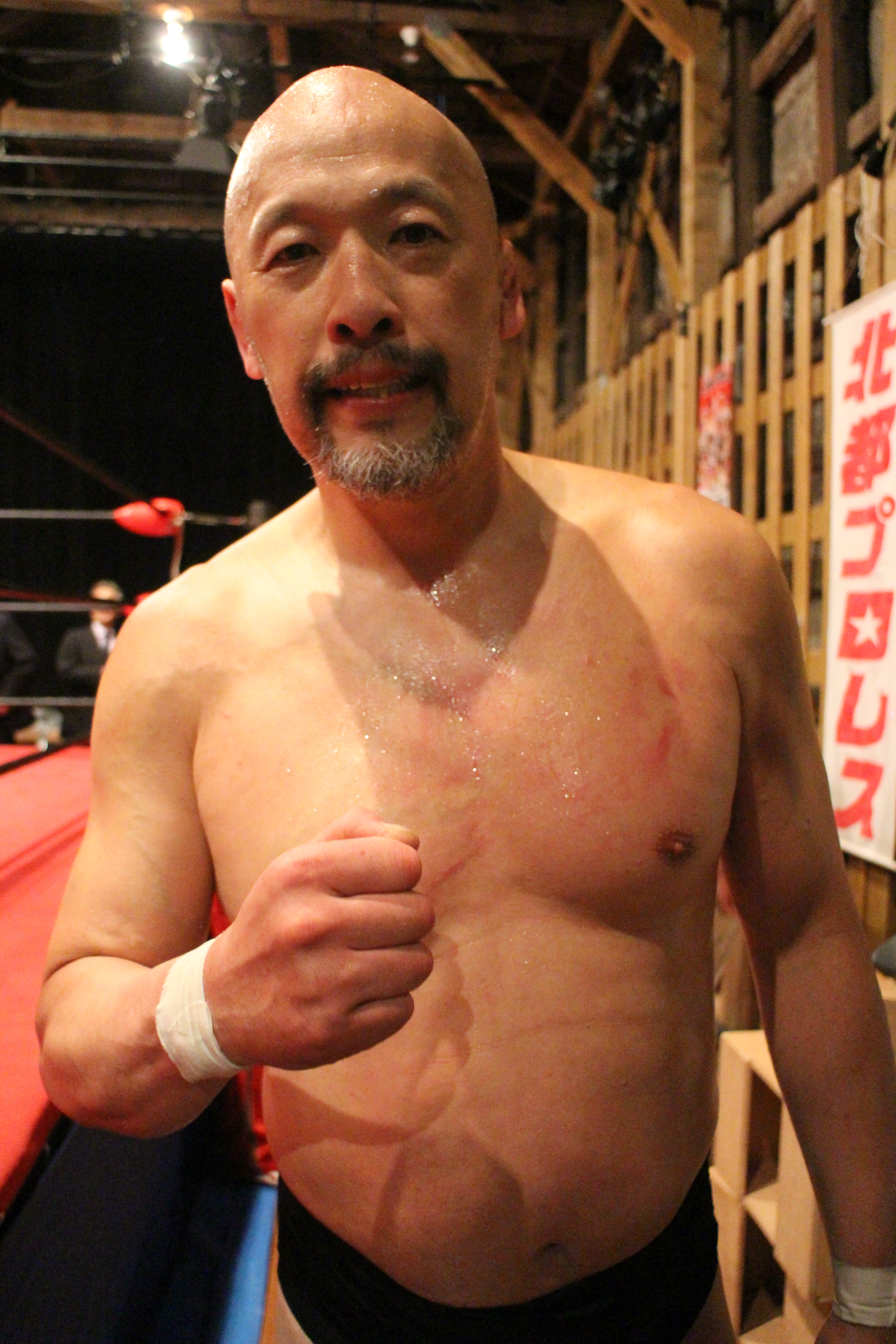 2015年5月28日 北都プロレス江別大会にて